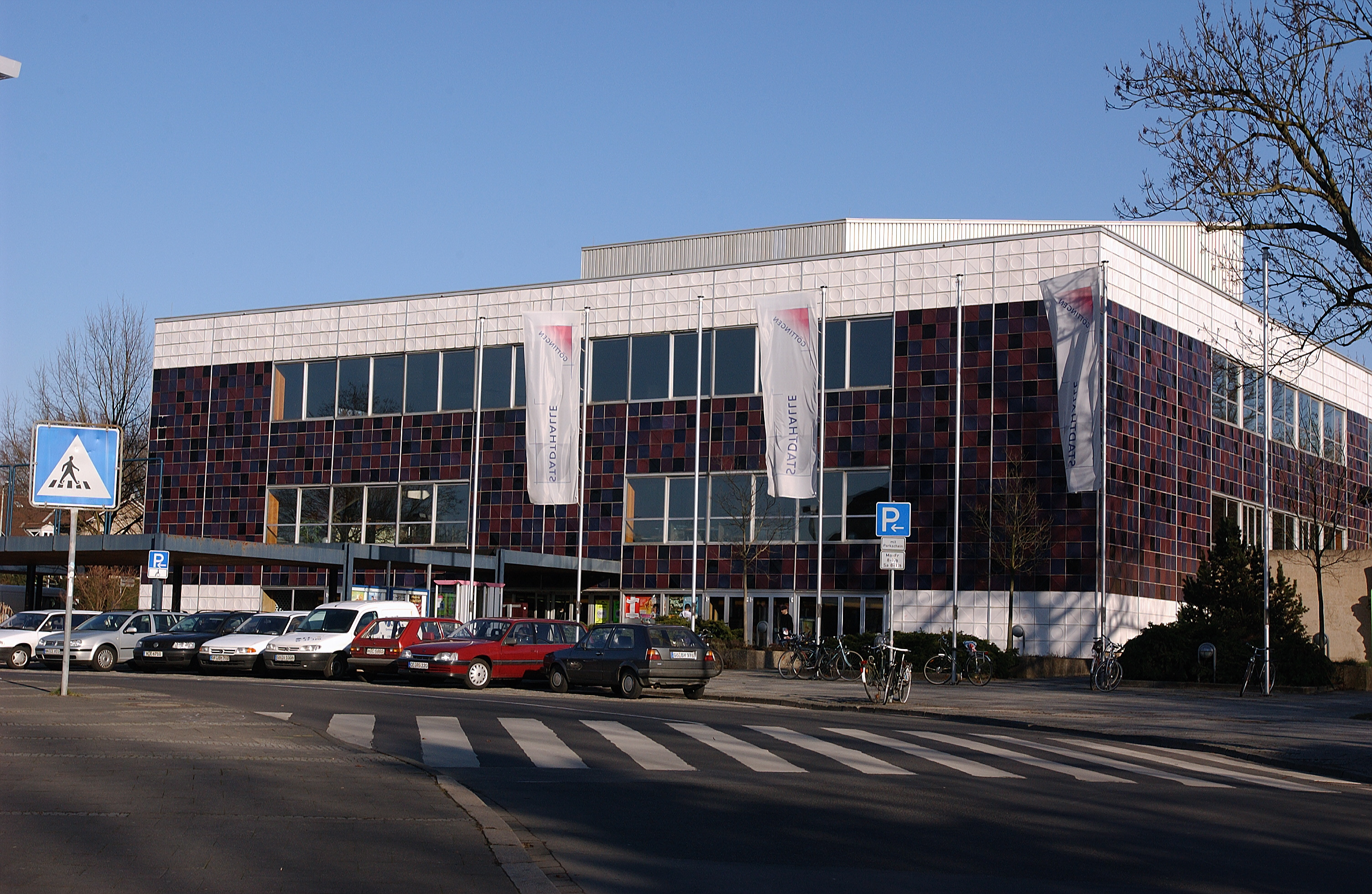 Goettingen, Stadthalle